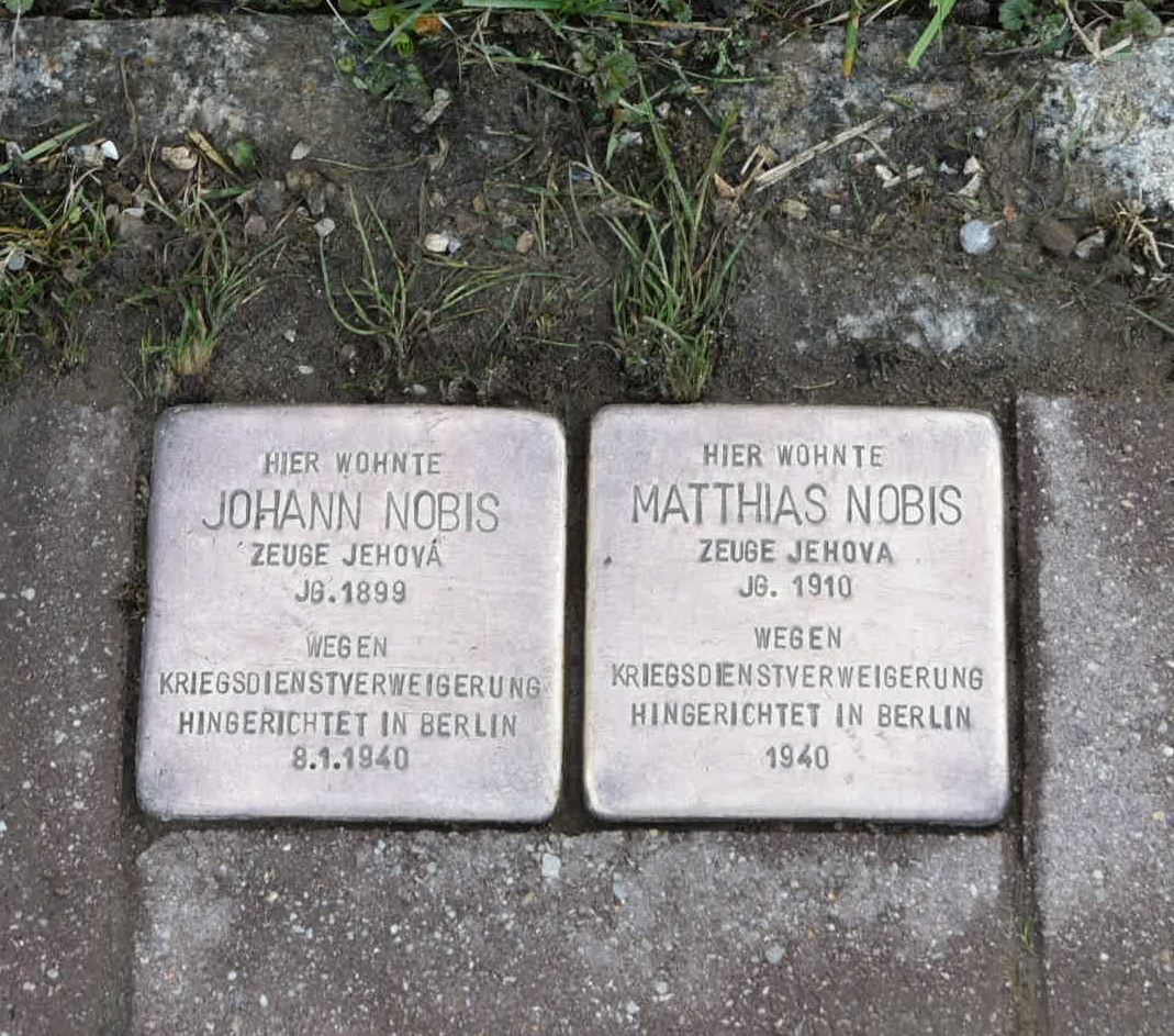 Stolpersteine für Johann Nobis und Matthias Nobis